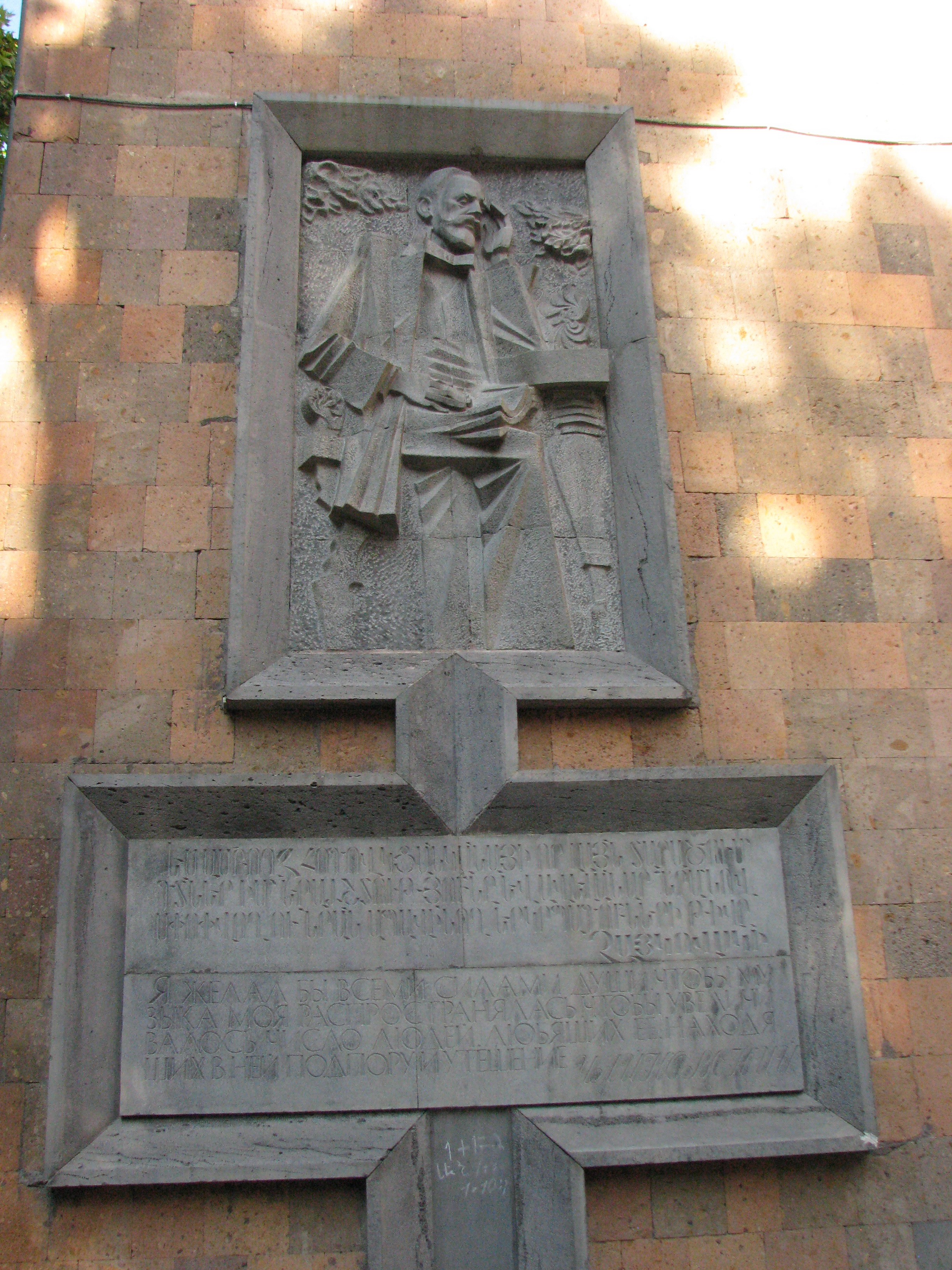 Բարձրաքանդակ «Չայկովսկի»: Գտնվում է Չայկովսկու անվ. երաժշտական դպրոցի մուտքի մոտ 6/13